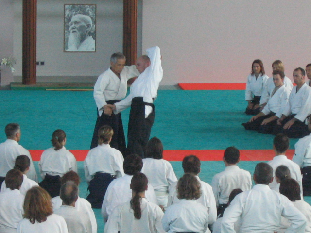 je suis l'auteur de cette image floue.